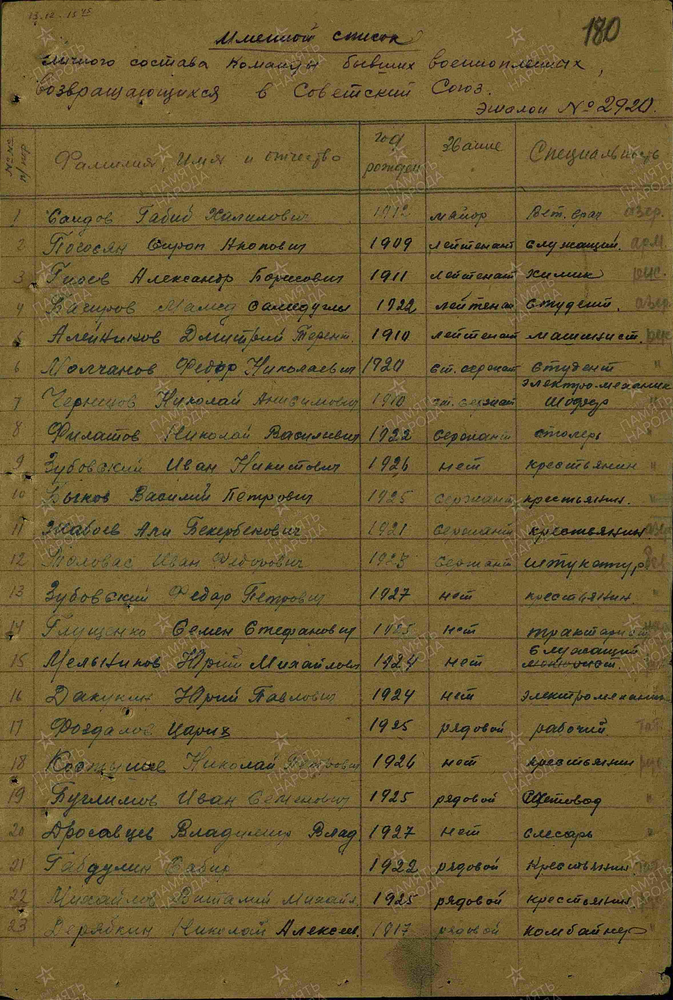 Список личного состава команды бывших военнопленных, возвращающихся в Советский Союз